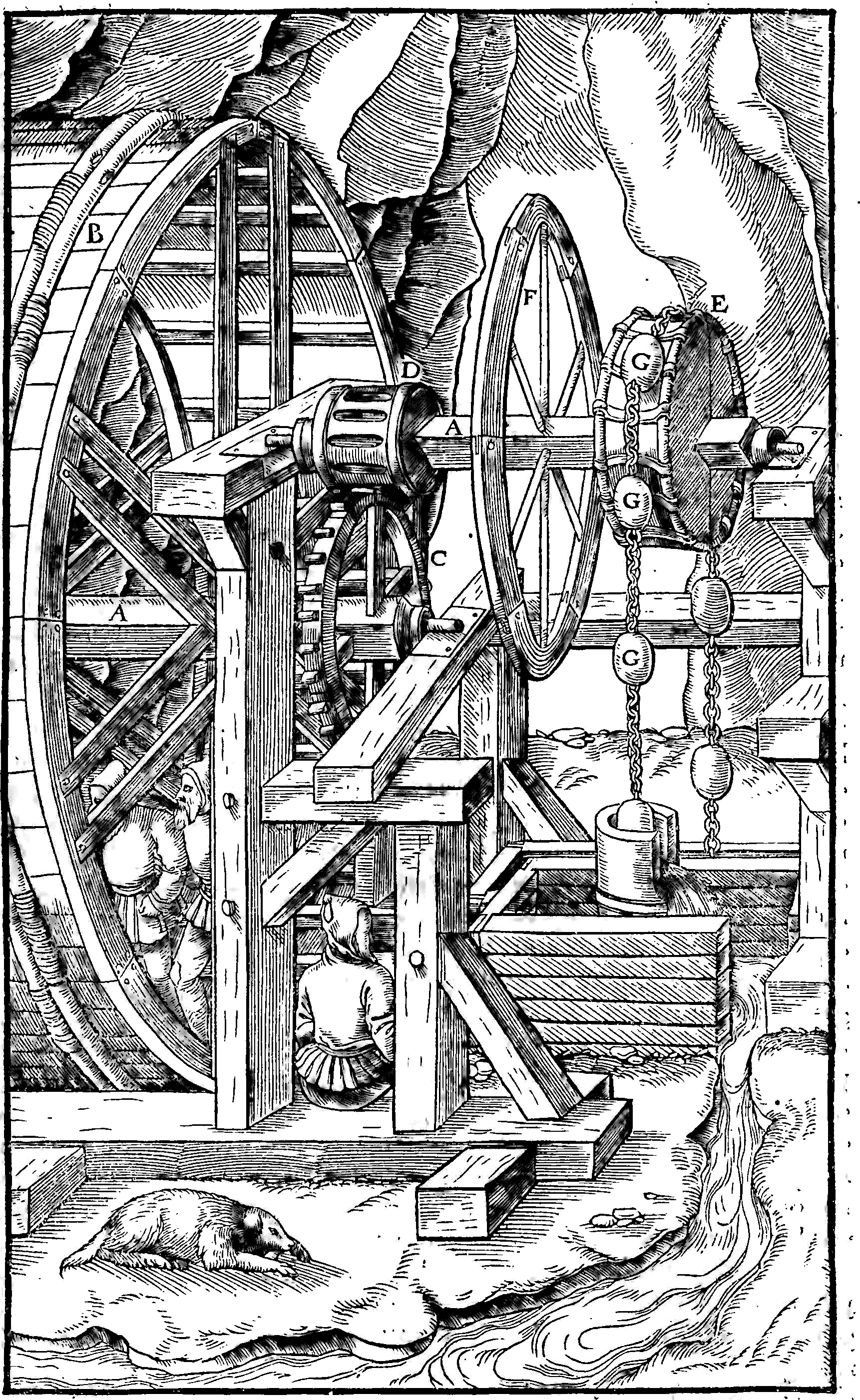 Incisione da De re metallica di Georg Agricola, Basilea, 1556